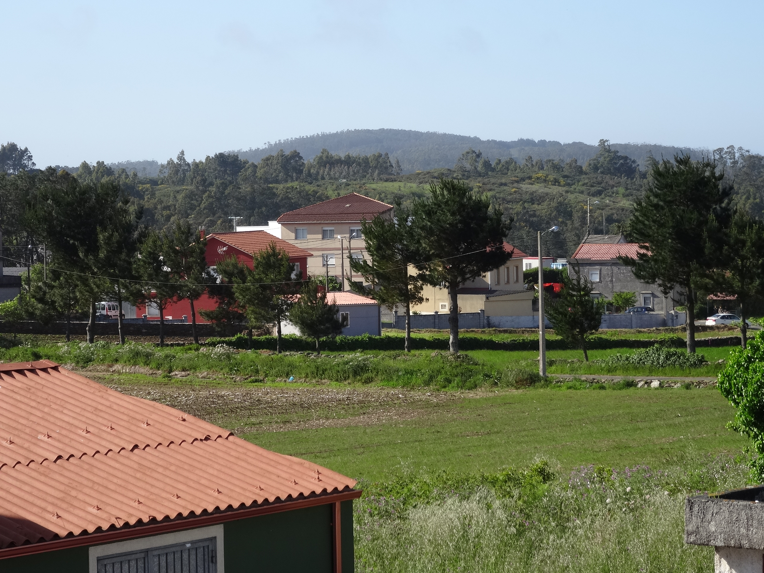 Vista de Aldeola no concello de Malpica de Bergantiños.